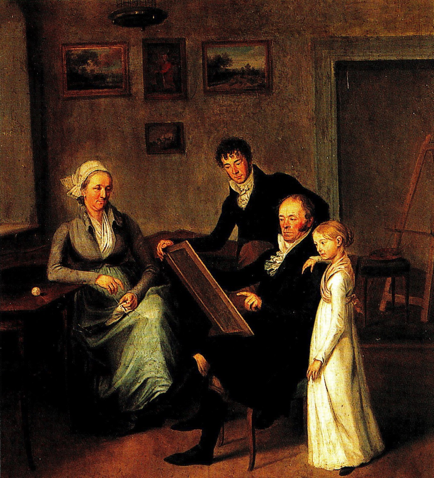 Johann Walch (1757–1815): Selbstbildnis im Kreis seiner Familie 1936 im Besitz von Frau Sanitätsrat M. Fries, Augsburg; 2002 im Besitz der Joh. Walch GmbH & Co., Augsburg